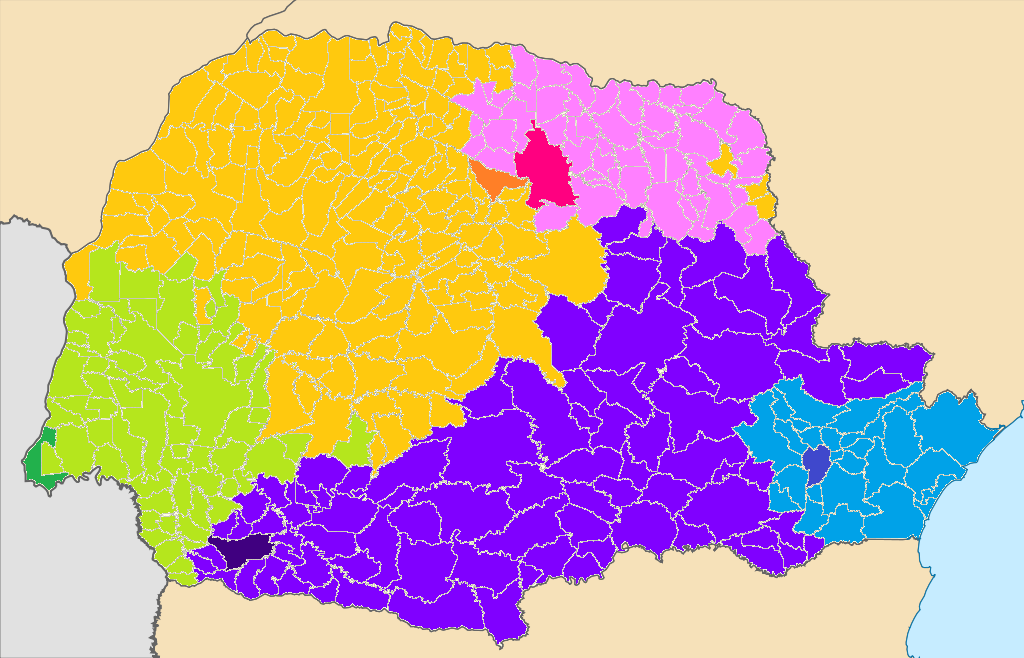 Cobertura das emissoras da Rede Massa, afiliada ao SBT no Paraná.